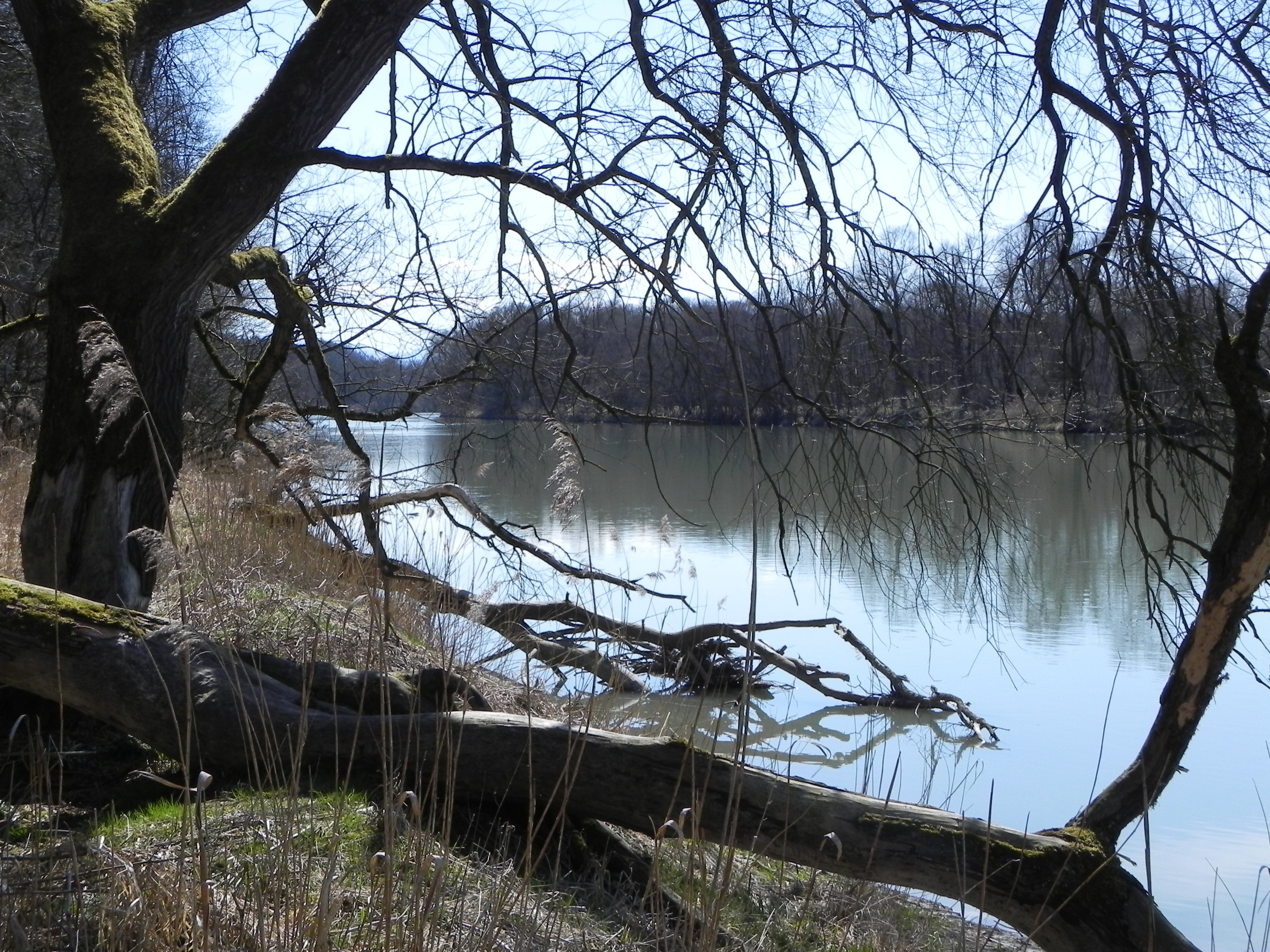 Vogelfreistätte Attel am Inn südlich von Wasserburg, Oberbayern